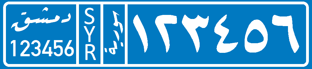 نمونه پلاک سوریه